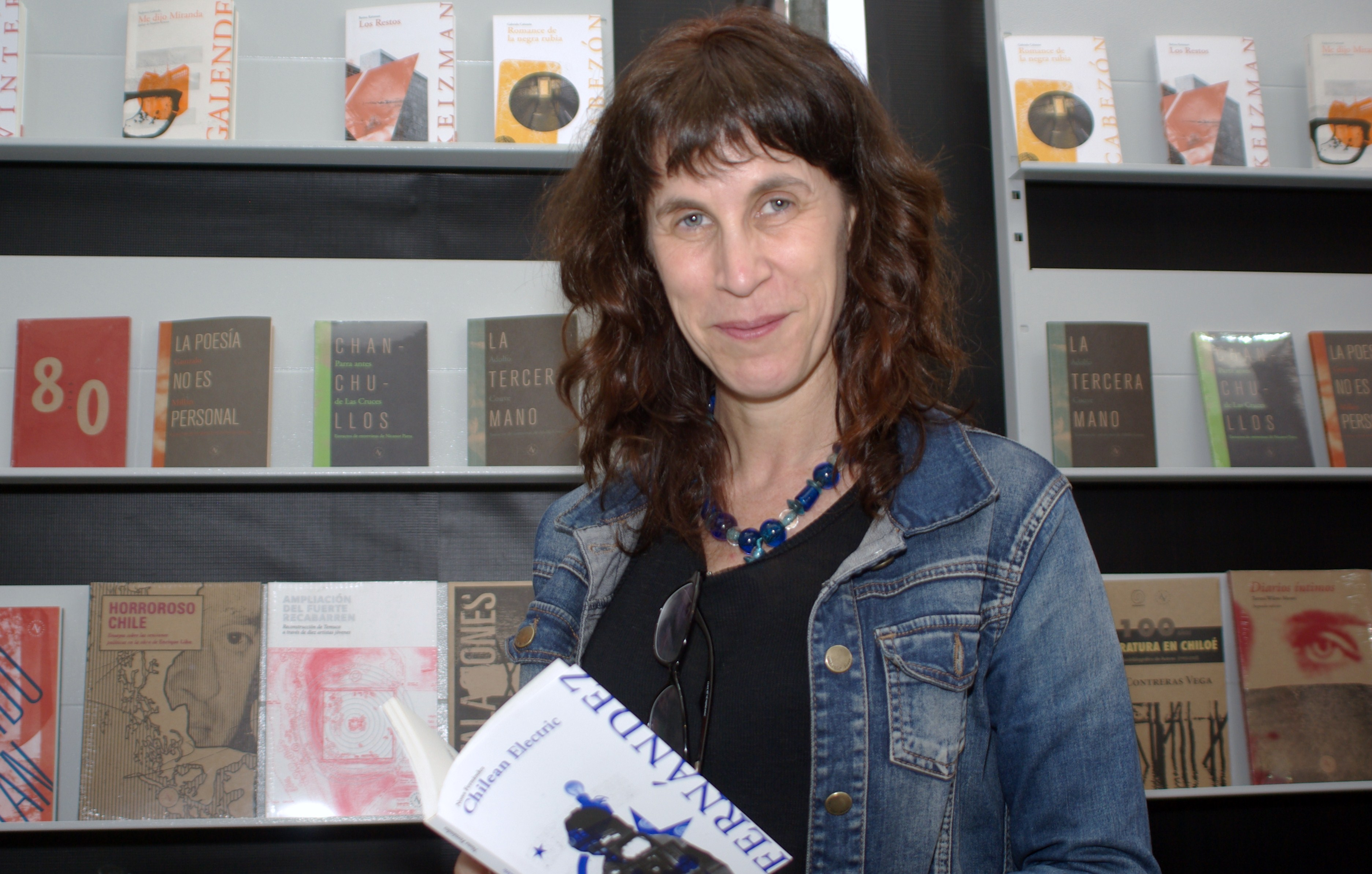 La escritora y actriz chilena Nona Fernández en la Feria Internacional del Libro de Santiago 2015